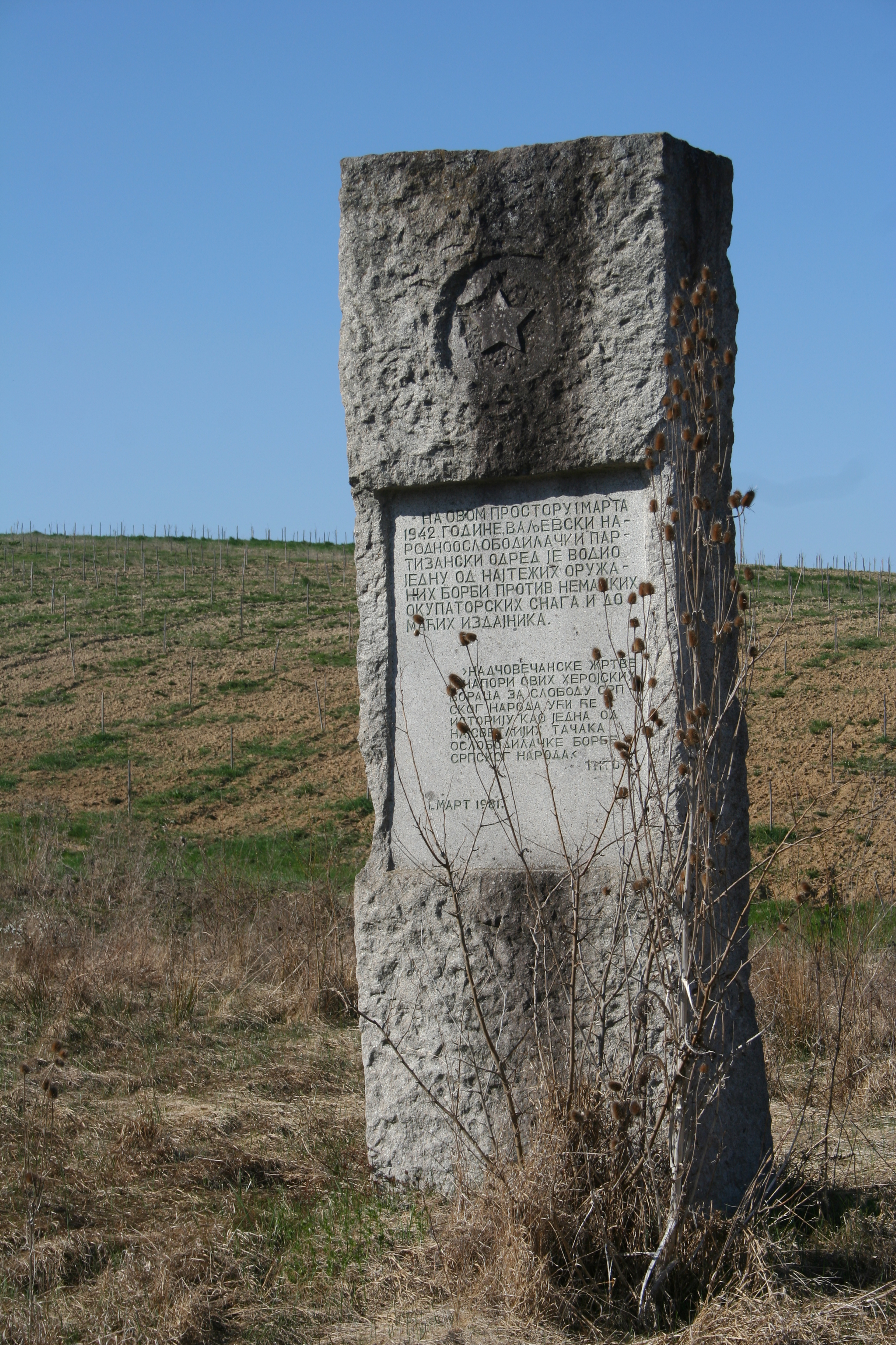 Spomenik NOB-a, Gola Glava